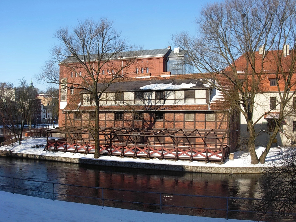 Karczma Młyńska (dawny spichlerz, wozownia) na Wyspie Młyńskiej w Bydgoszczy